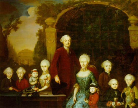 Det Fengerske familieportræt